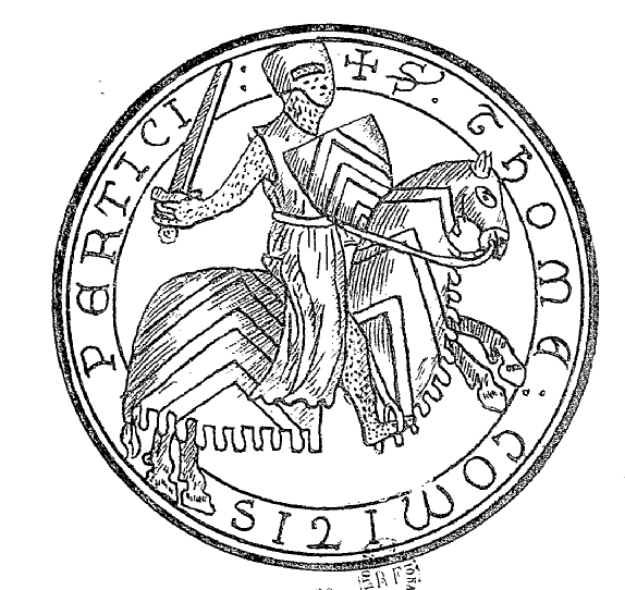 Tomáš z Perche